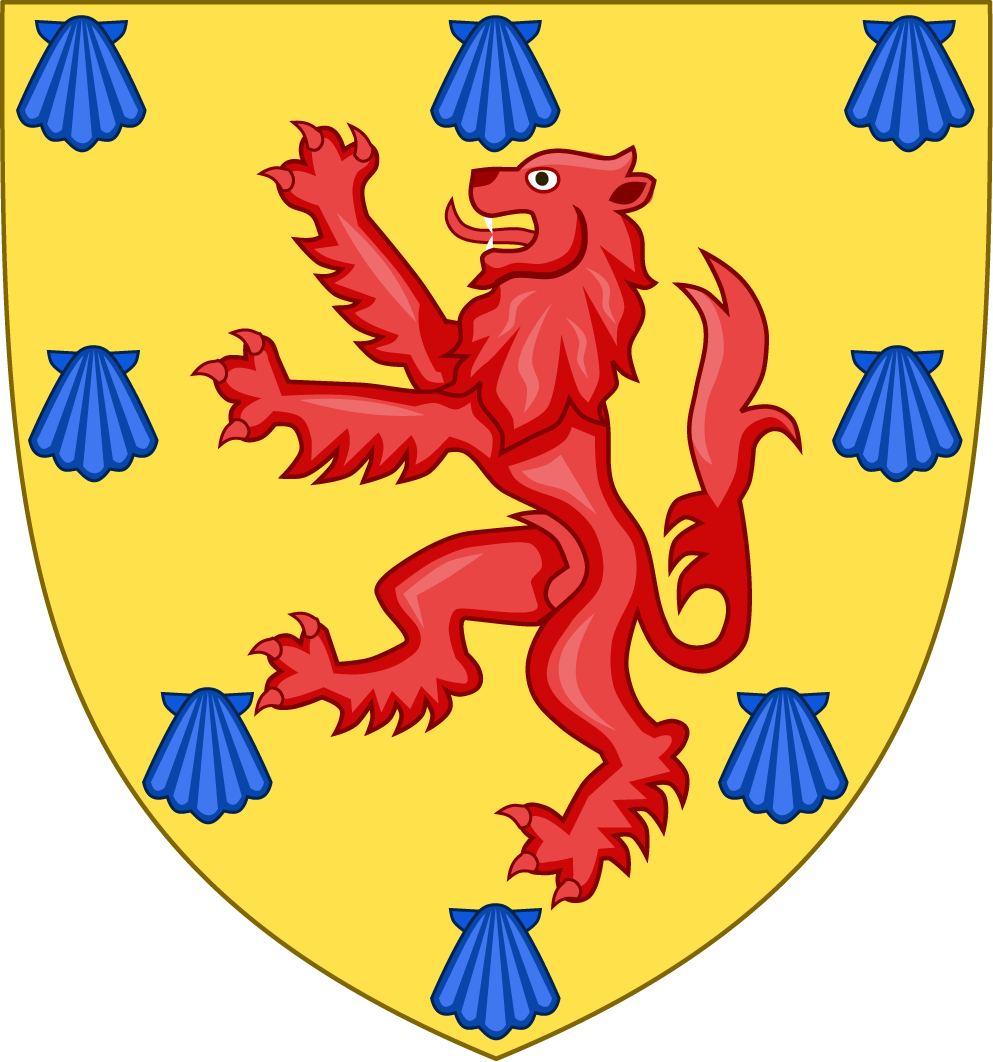 Armes des anciens sires de Bourbon (maison de Dampierre)